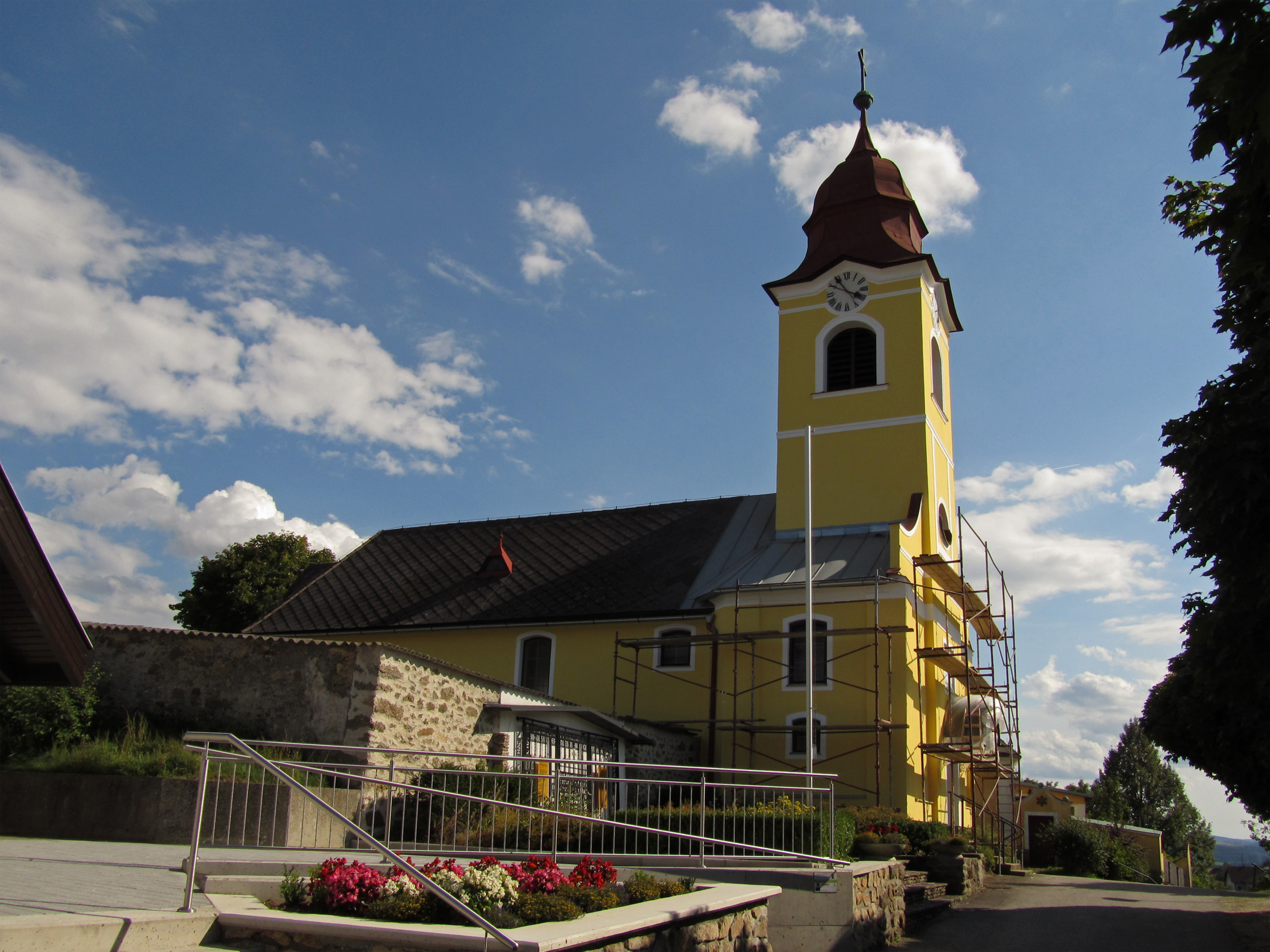 Die 1700–1706 erbaute, barocke Saalkirche hat einen Westturm von 1798 und ist mit Friedhof und Pfarrhof zu einer Einheit verbunden.